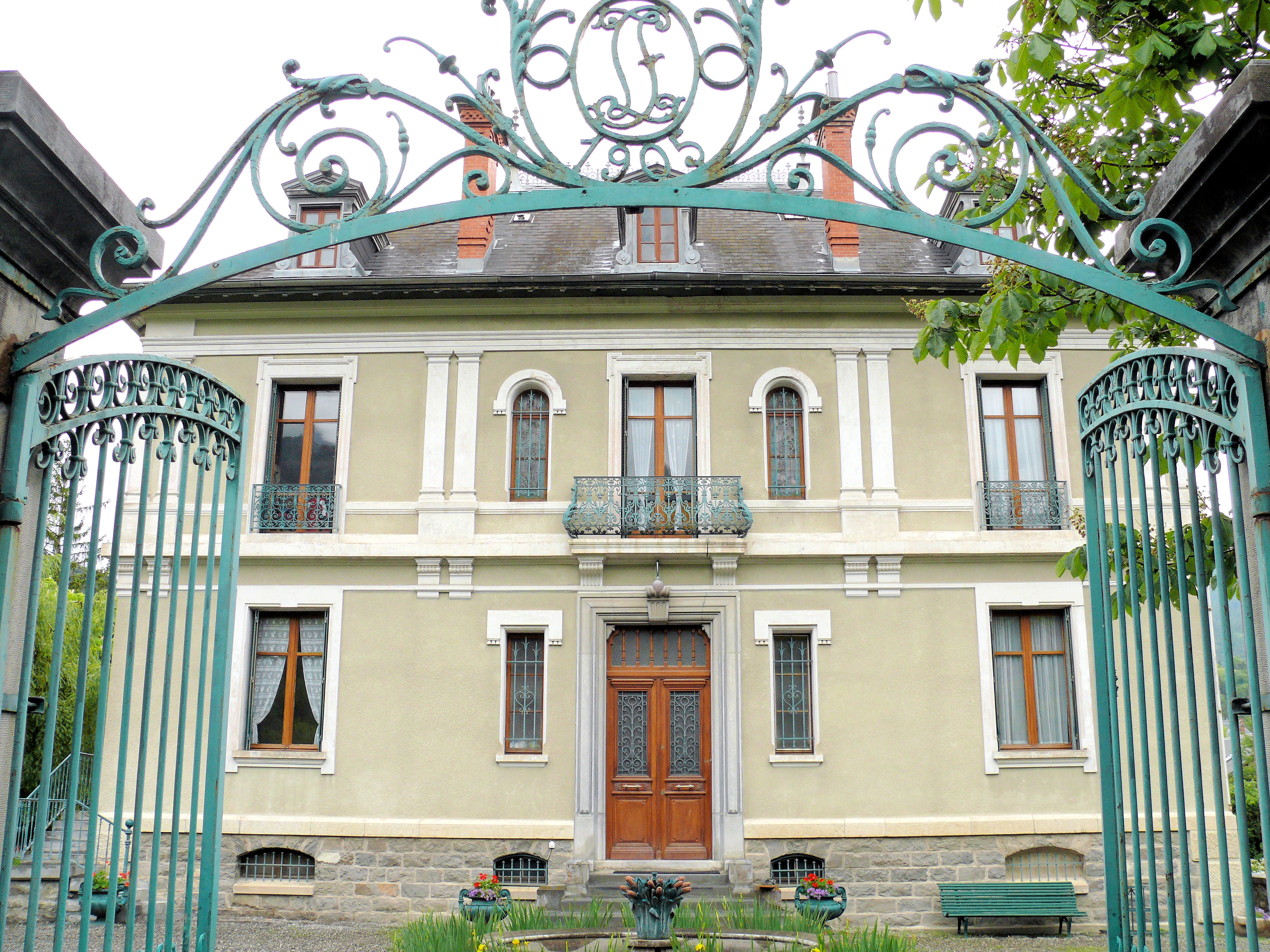 Barcelonnette - Villa mexicaine